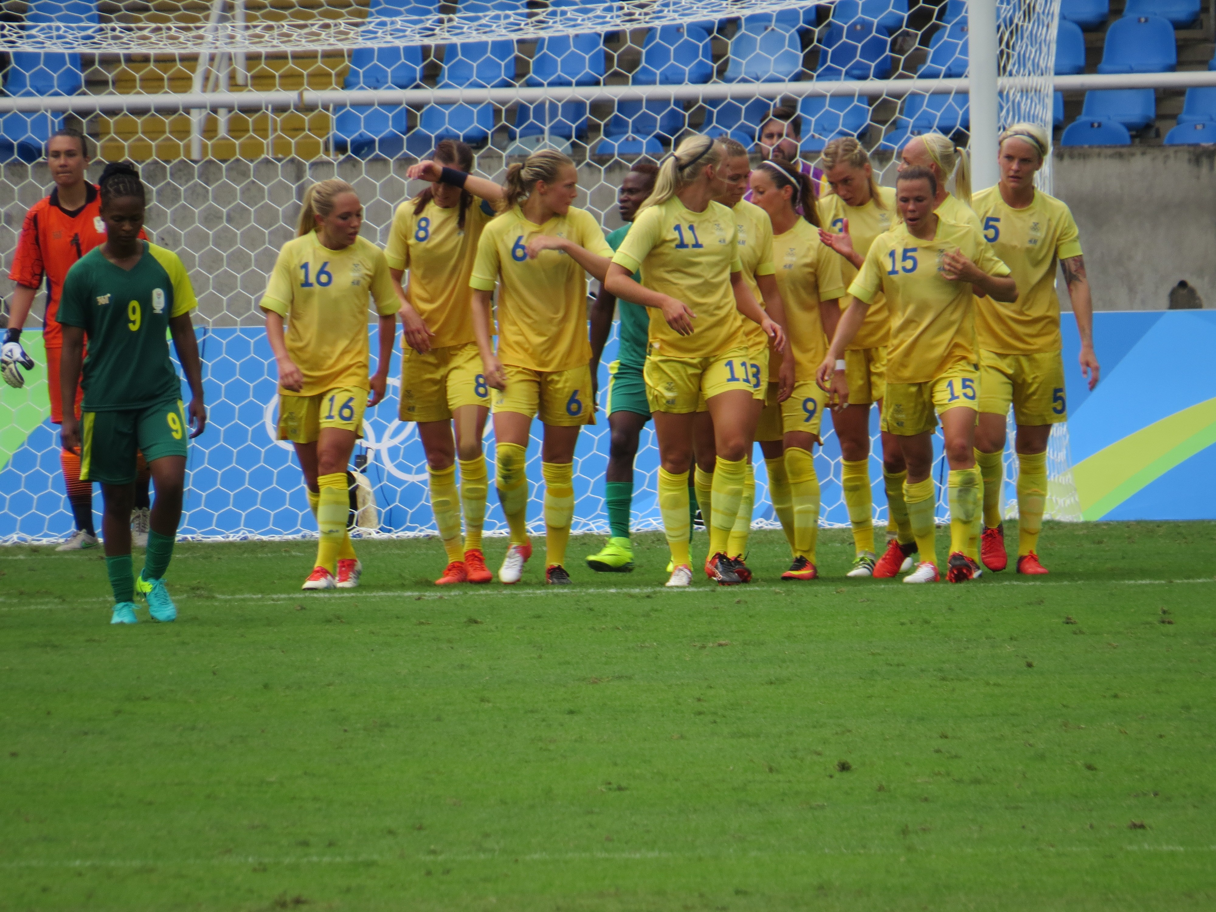 Futebol feminino Suécia 1 x0 Africa do Sul 03/08/16